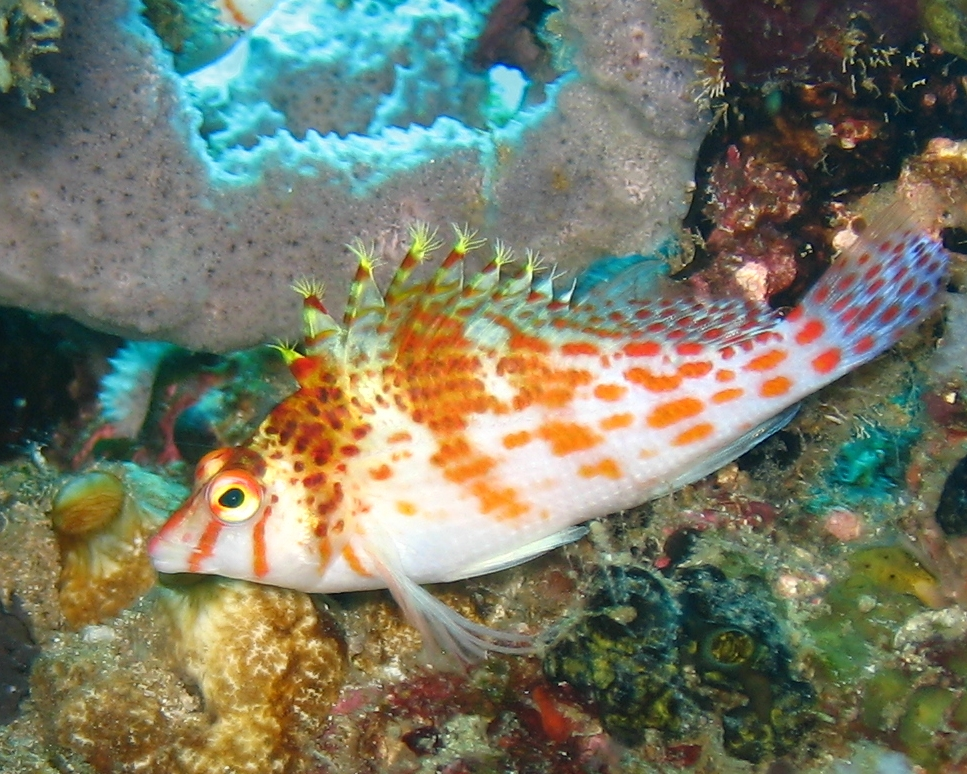 Dwarf hawkfish (Cirrhitichthys falco)